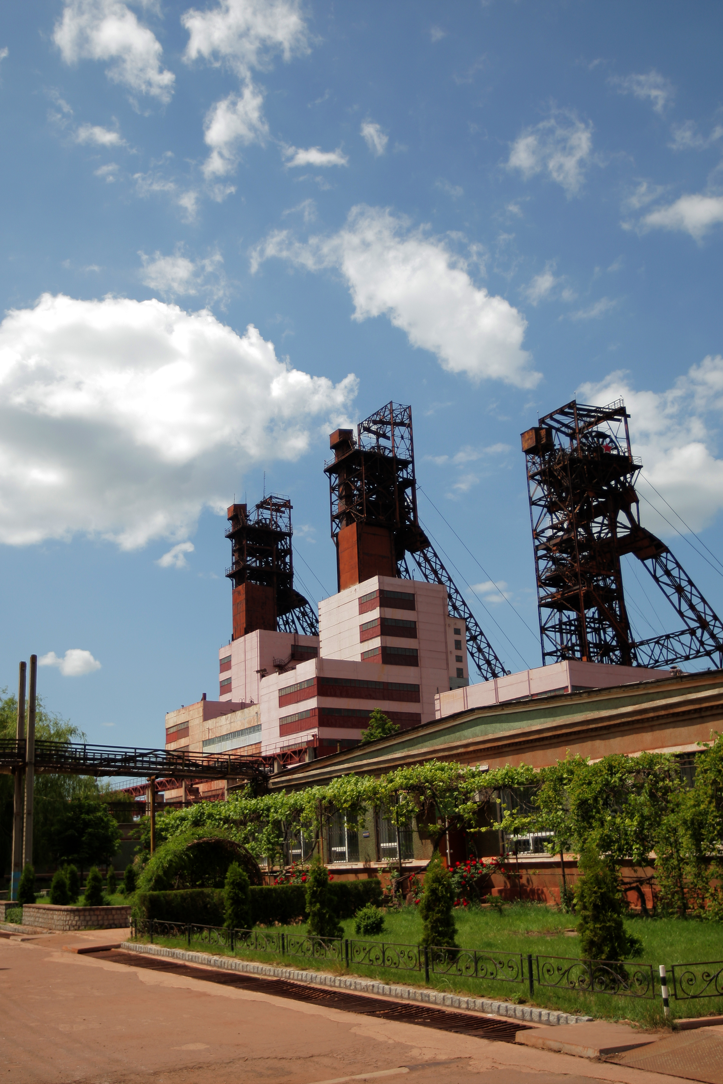 Центральная группа стволов